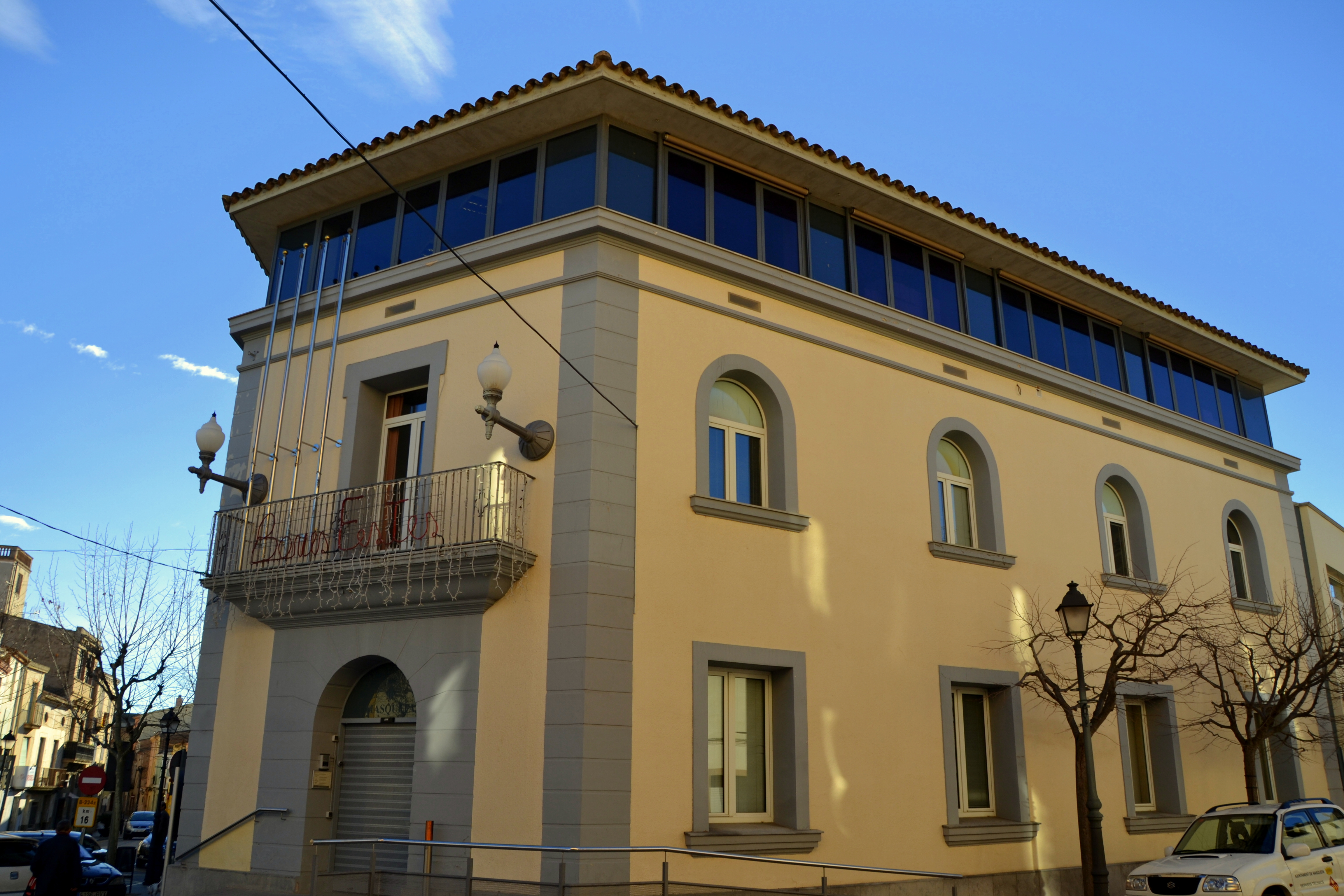 Ajuntament (Masquefa)